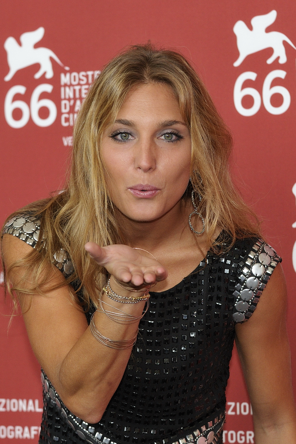 66ème Festival du Cinéma de Venise (Mostra), 4ème jour (05/09/2009)